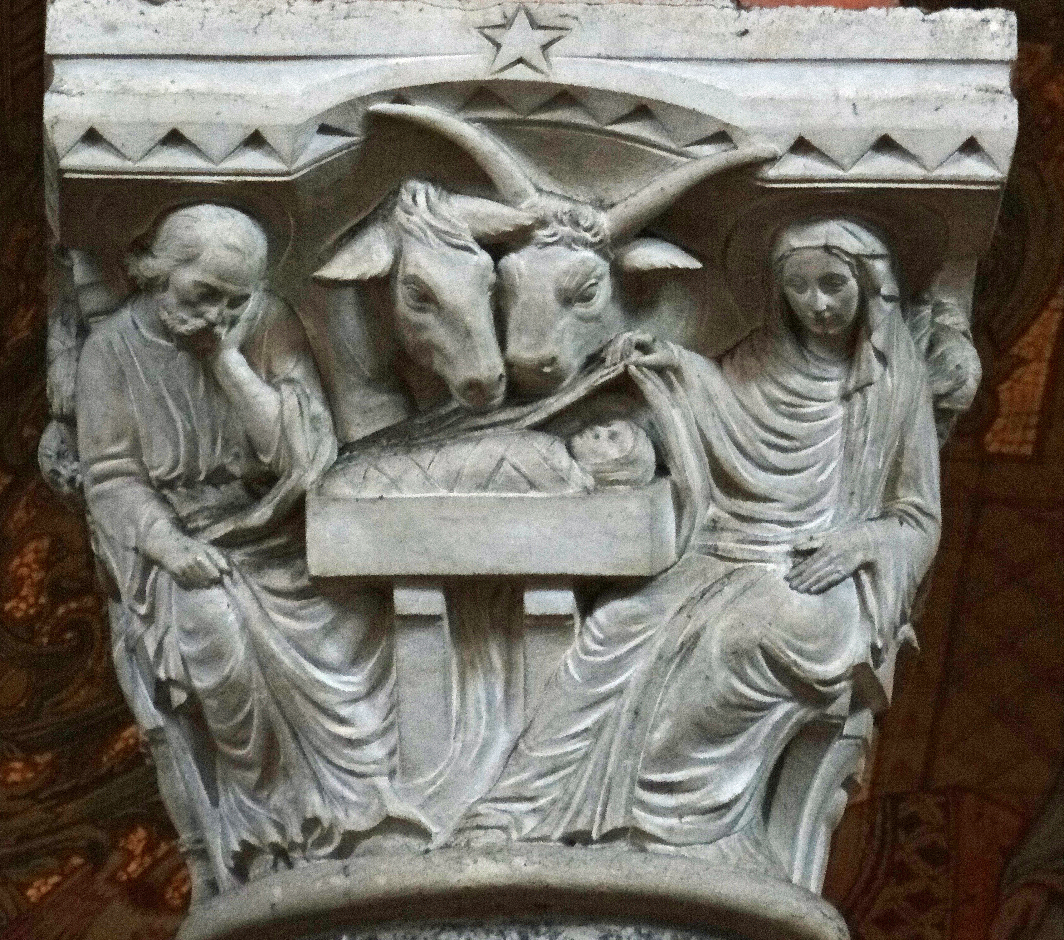 Villeneuve-sur-Lot - Intérieur de l'église Sainte-Catherine - Chapiteau de la nef